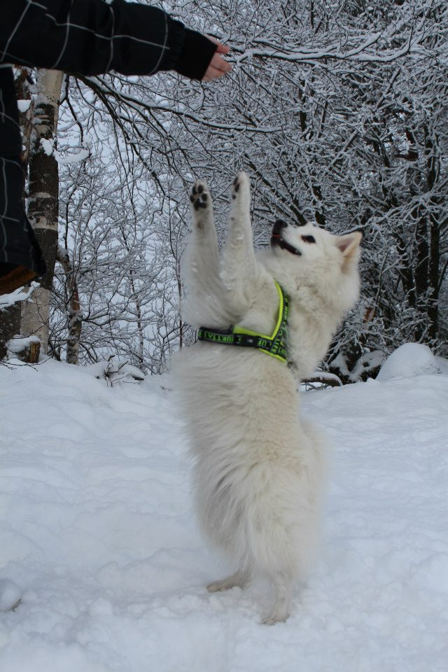 Mittelit miellyttävät omistajiaan mielellään ja oppivat nopeasti uusia temppuja.